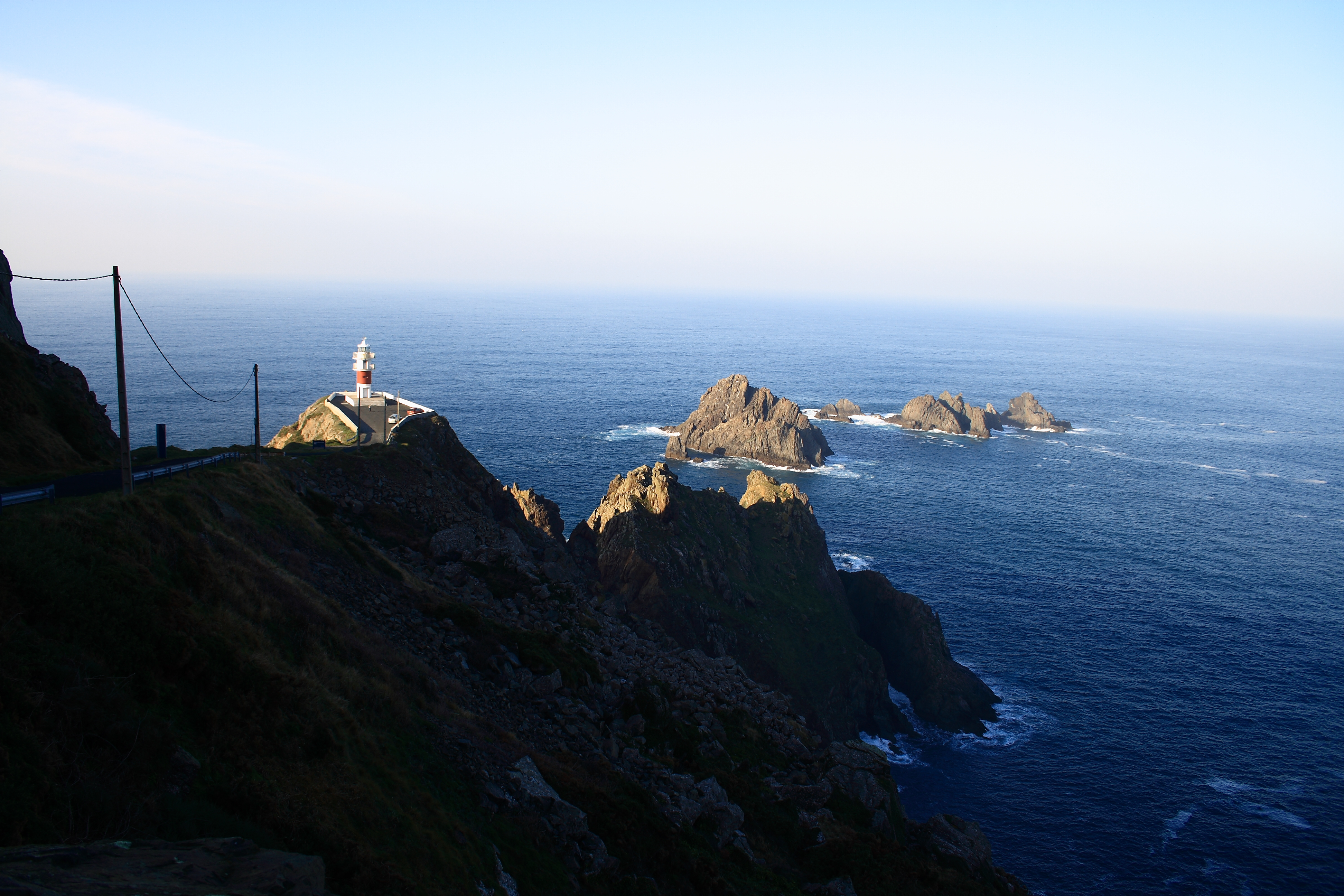 Vista de Cabo Ortegal desde el camino de aceso al mismo